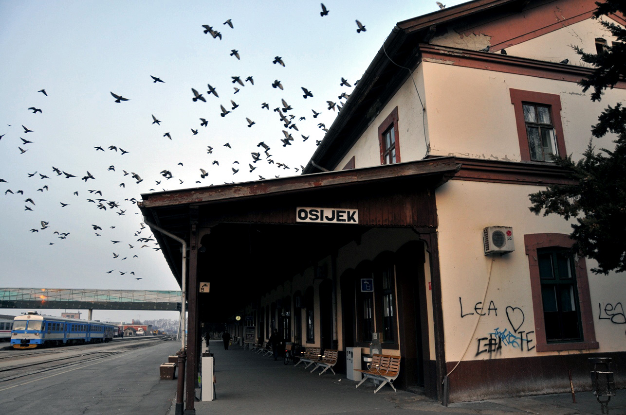 Osijek railway station